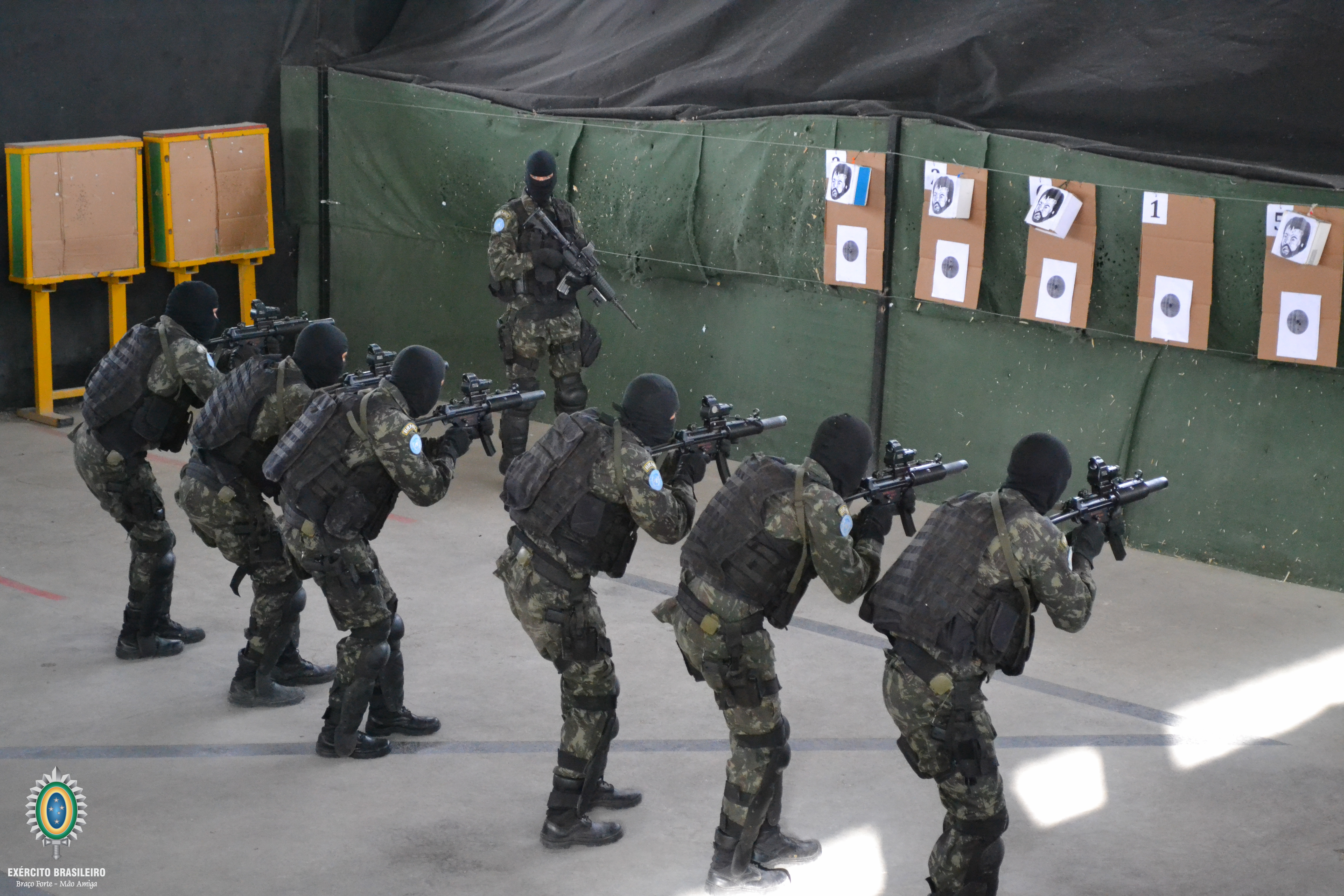 Comandos, Forças Especiais, combatente, Exército, Tiro instintivo caatinga, paraquedistas, atirador, sniper, mergulhadores